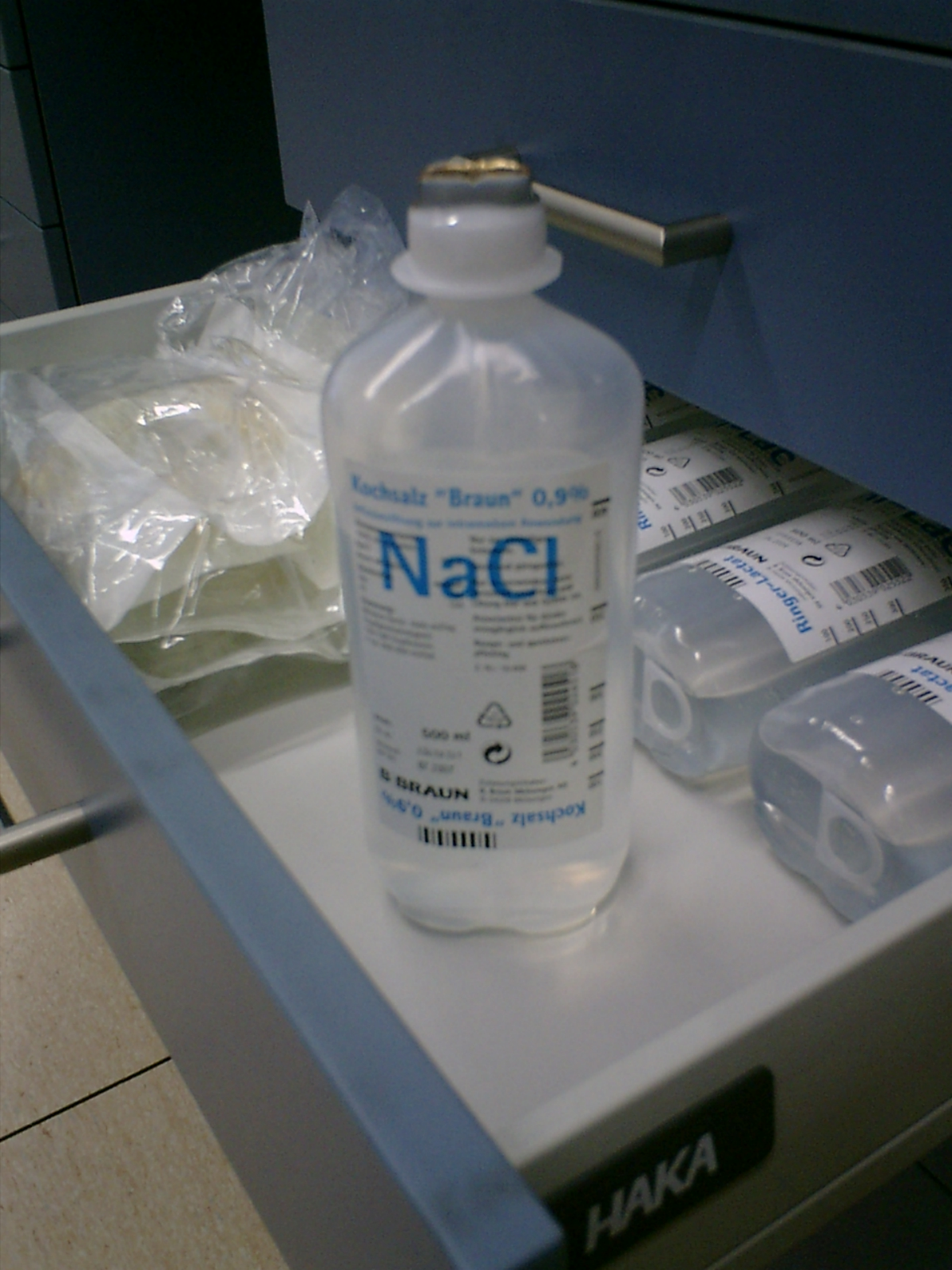 Eine 500ml-Infusionsflasche NaCl